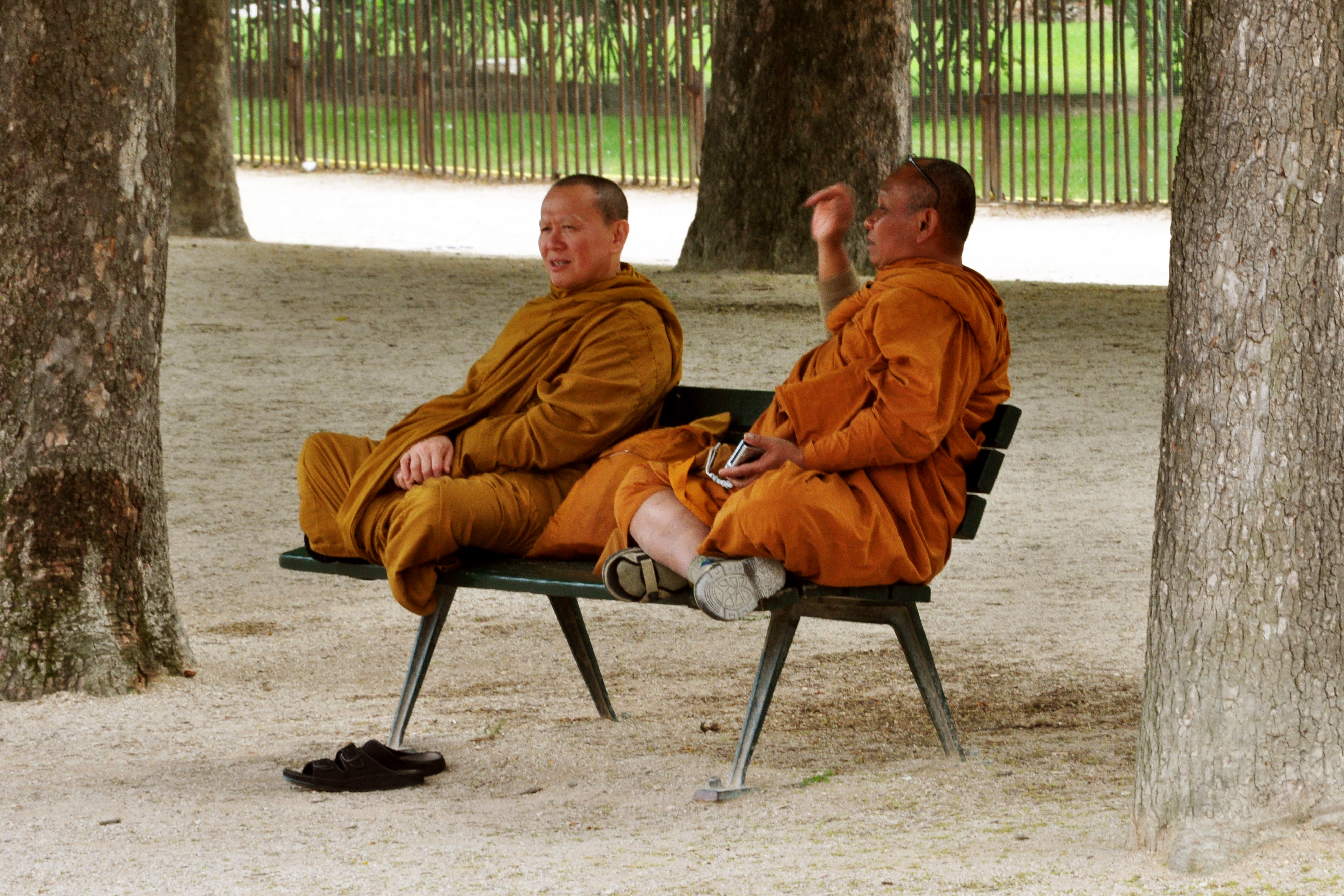 Jardin des Plantes